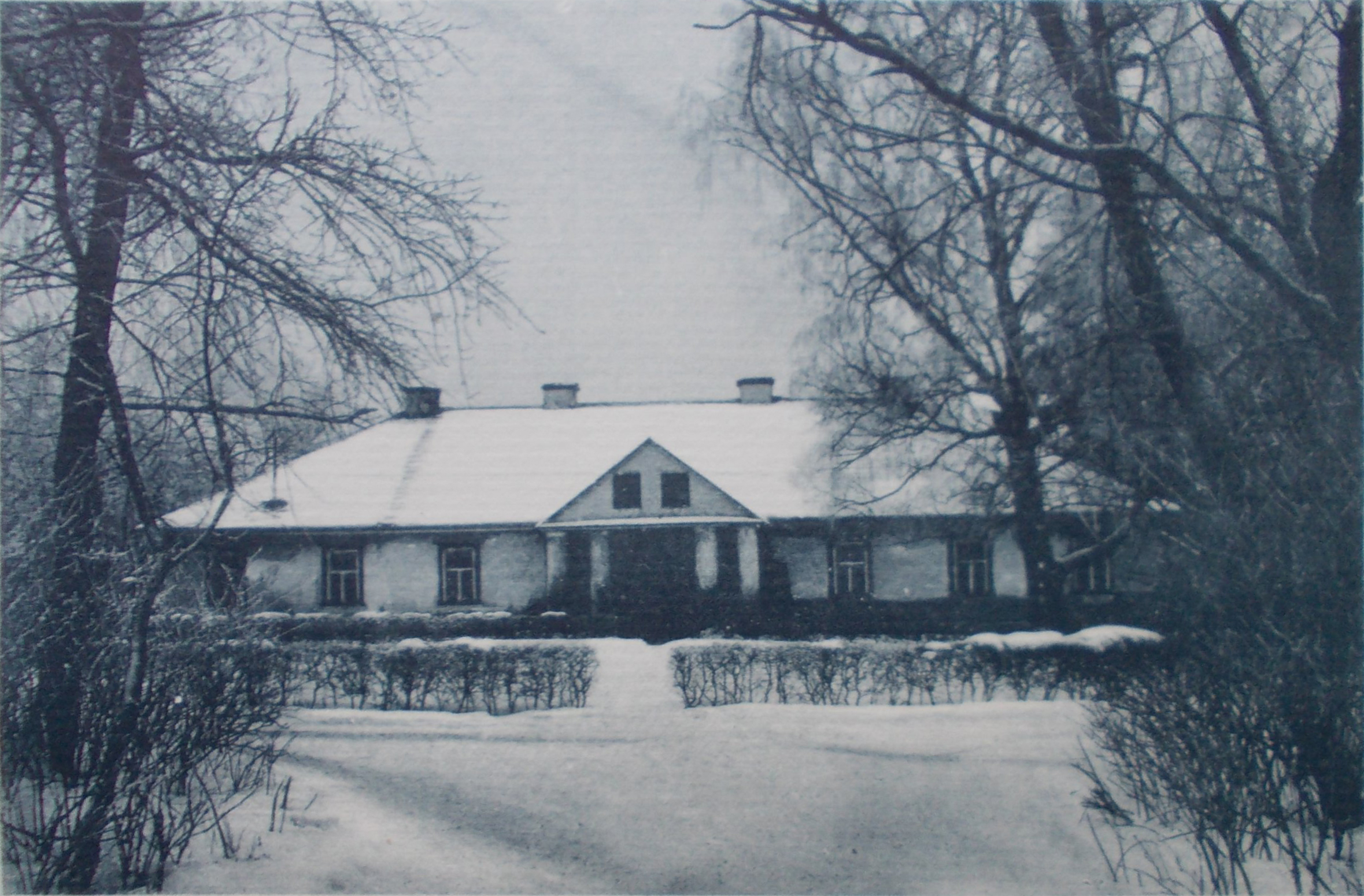 Беларуская (тарашкевіца): Дамашэвічы (Damaševičy), сядзіба Леяў (Lej)